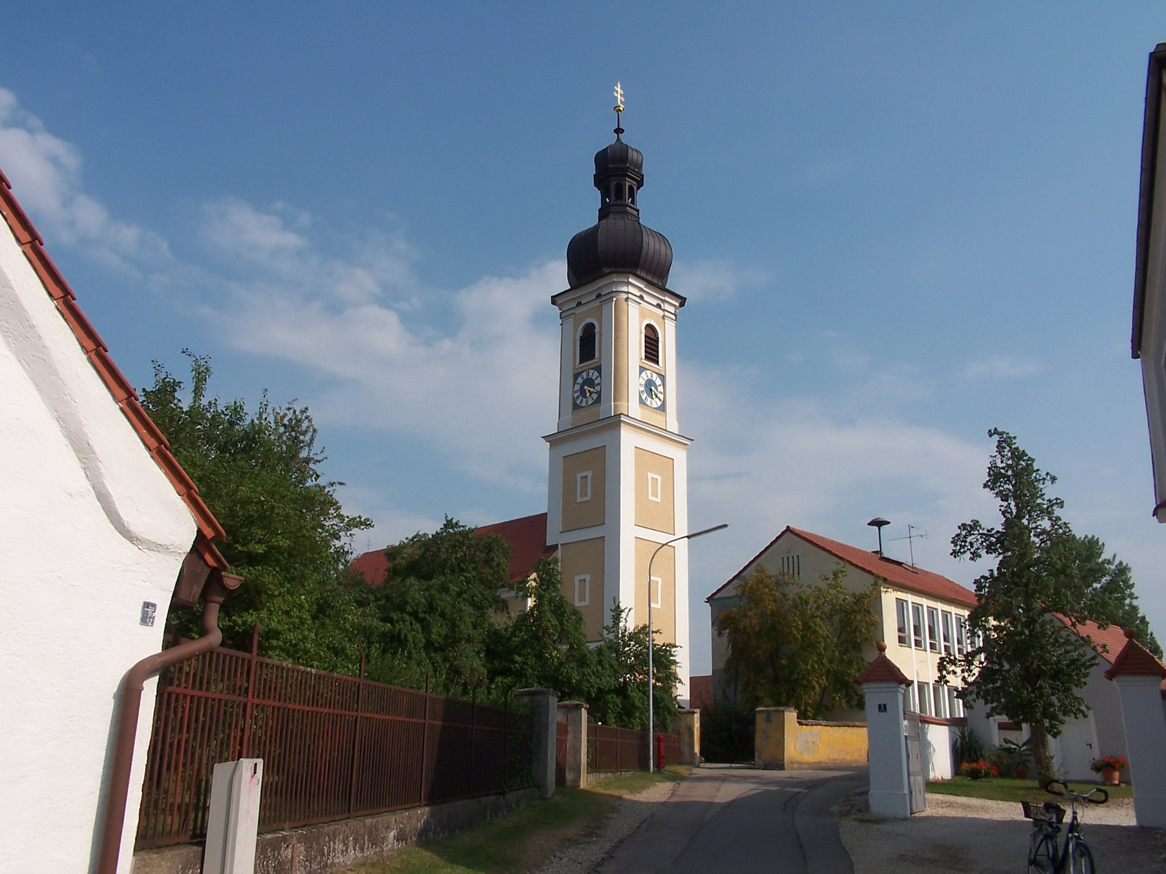 Pfatter, Geisling, Schulweg 3. Katholische Pfarrkirche Mariä Geburt, Saalbau mit eingezogenem Chor, Westturm mit Zwiebelhaube und Laterne, Putzgliederungen, im Kern gotisch, Westturm 1724; katholische Kapelle St. Ursula, Saalbau mit eingezogener Apsis, 1365; mit Ausstattung; Friedhofsmauer, Mischmauerwerk, wohl barock.